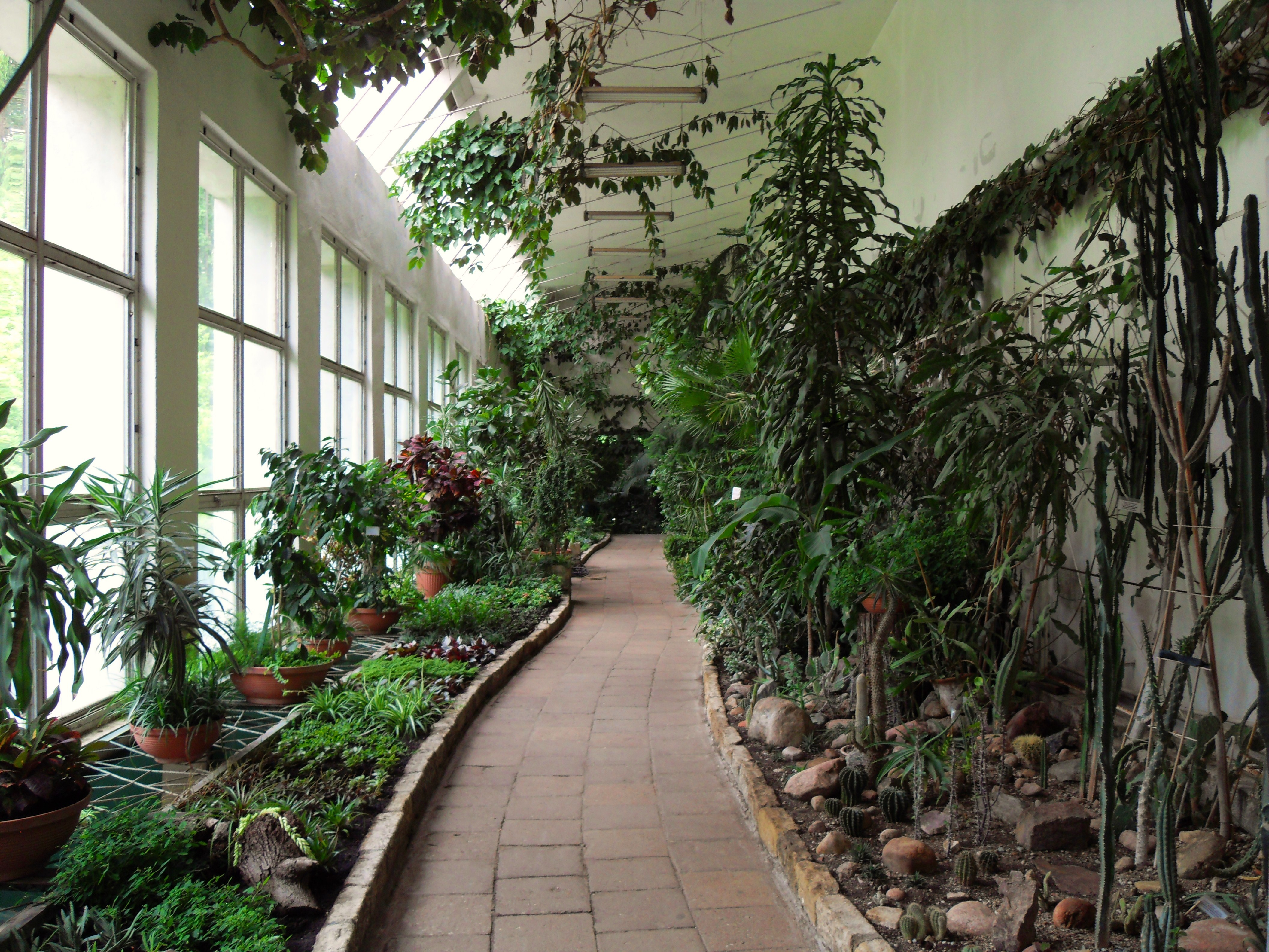 Gdańsk Oliwa, stara część palmiarni.